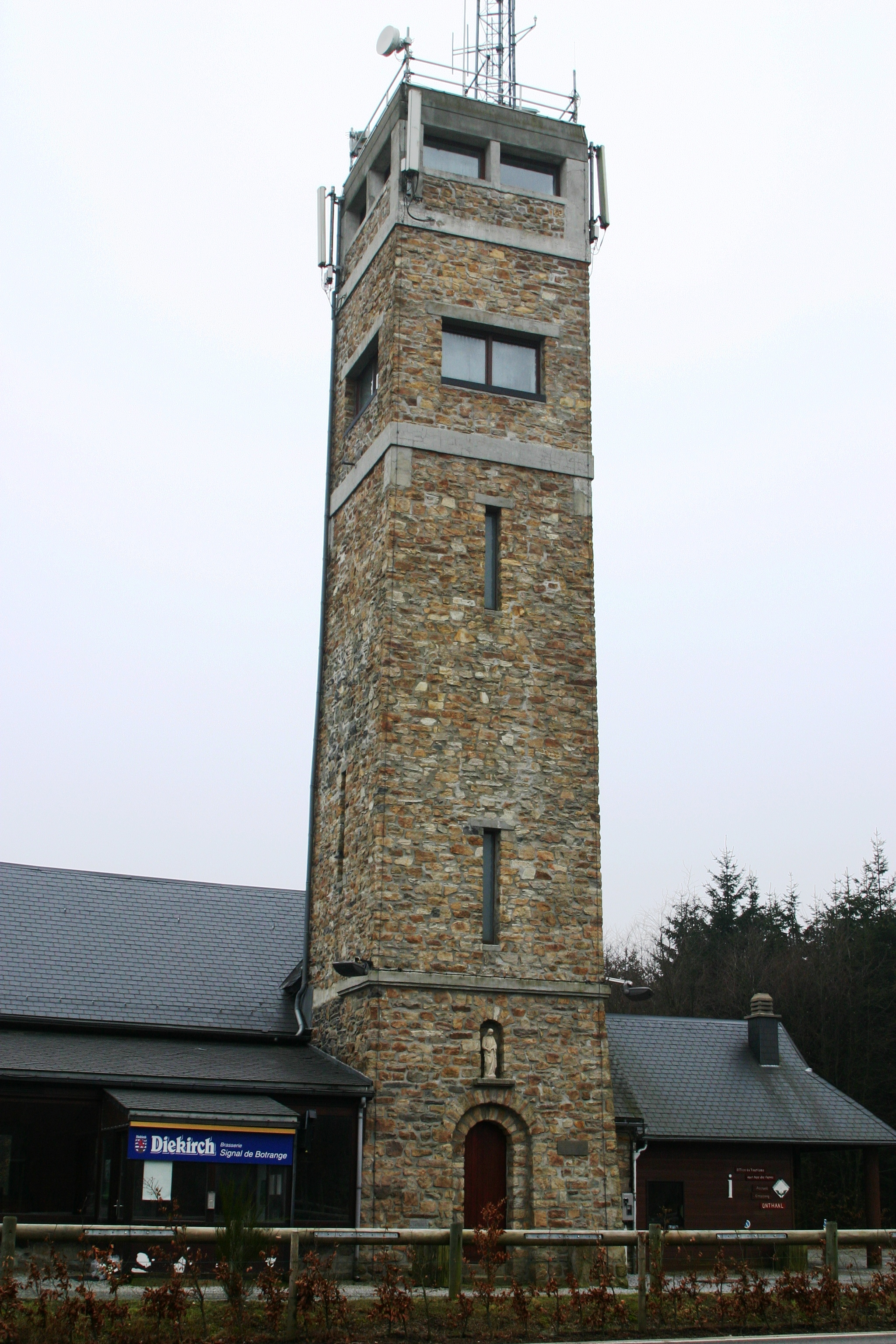 Signal de Botrange.